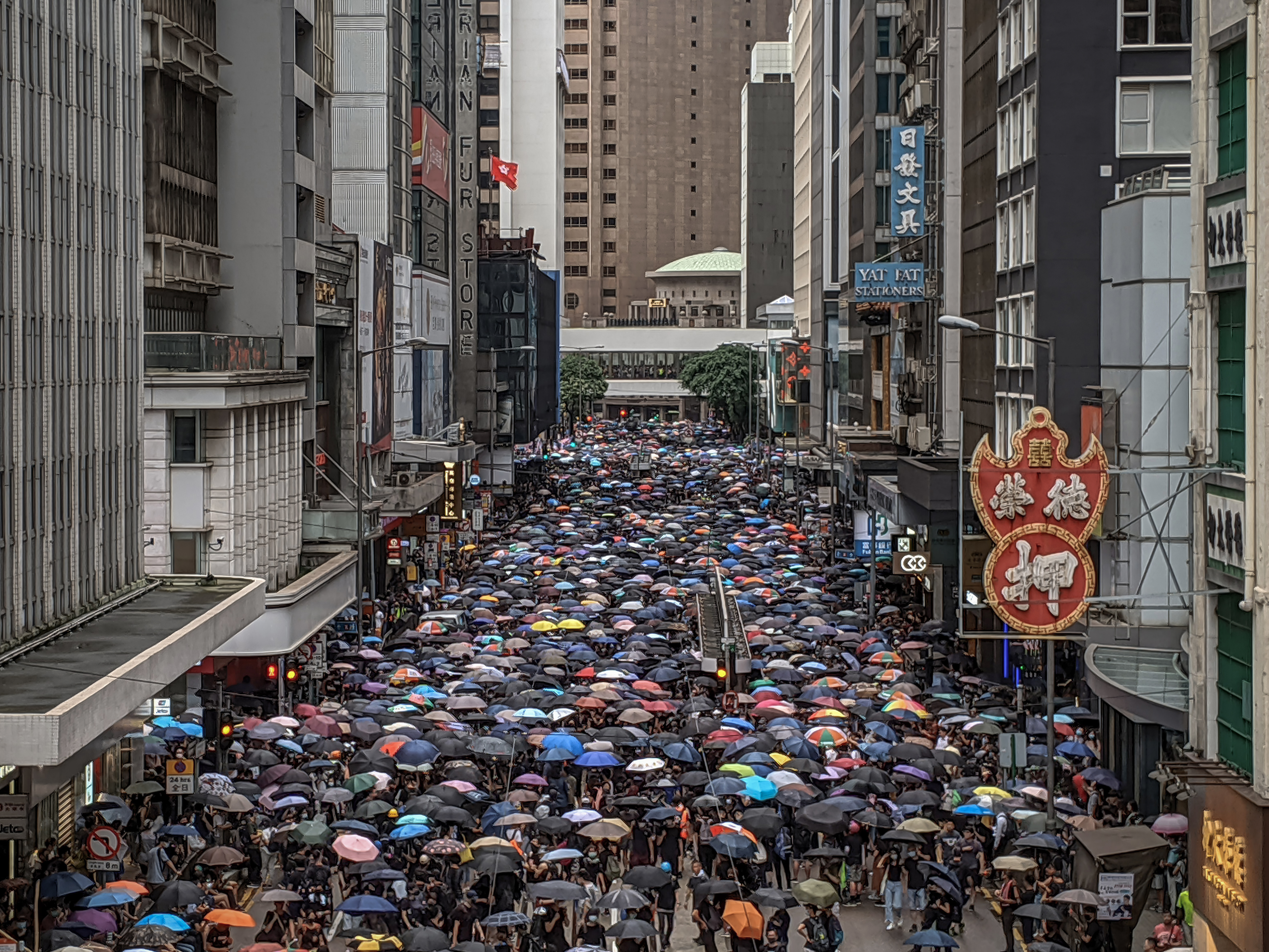 IMG_20190831_163305-edit